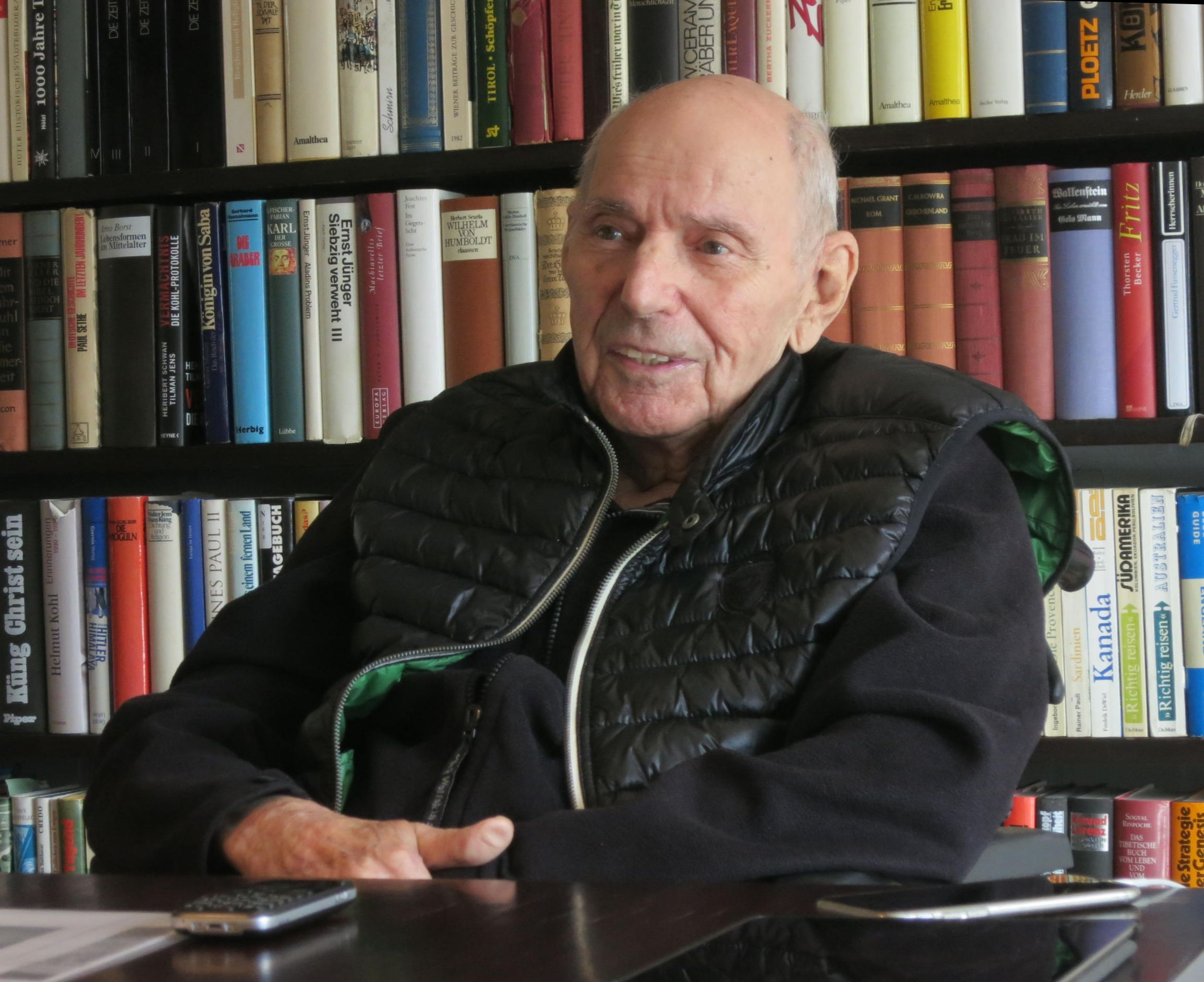 Architekt Prof. Fritz Eller, im Gespräch mit Dr. Gabriele Wiesemann, Dr. Wolfgang Voigt und Erasmus Eller, in seinem Wohnhaus in Aachen